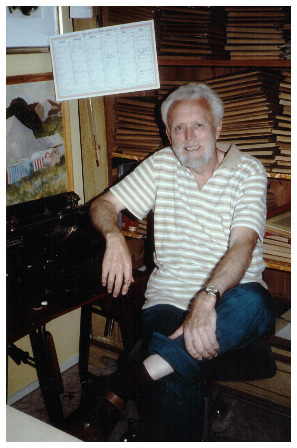 Anders Enevig i sit arkiv 1995